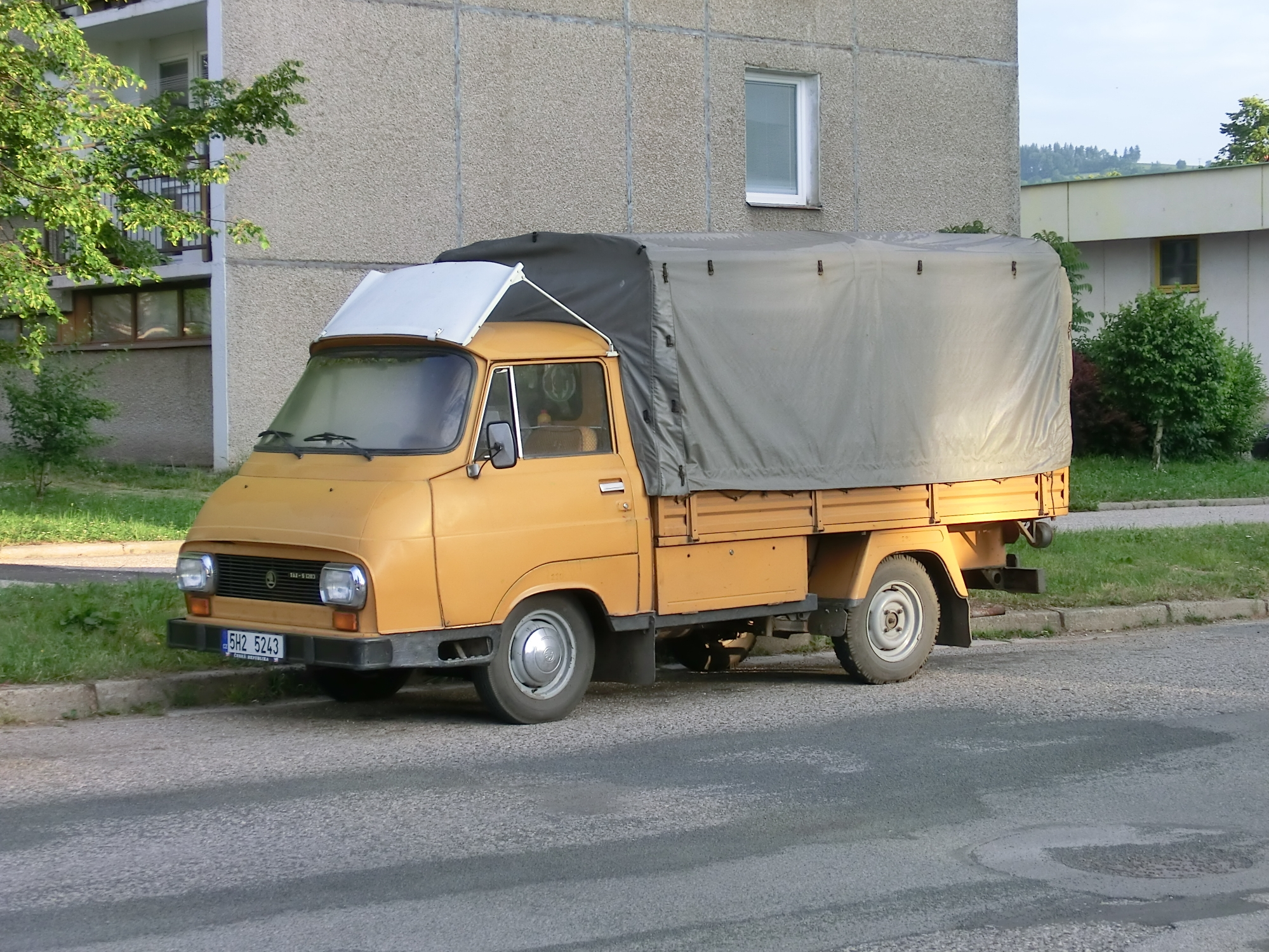 TAZ - Škoda 1203 valník